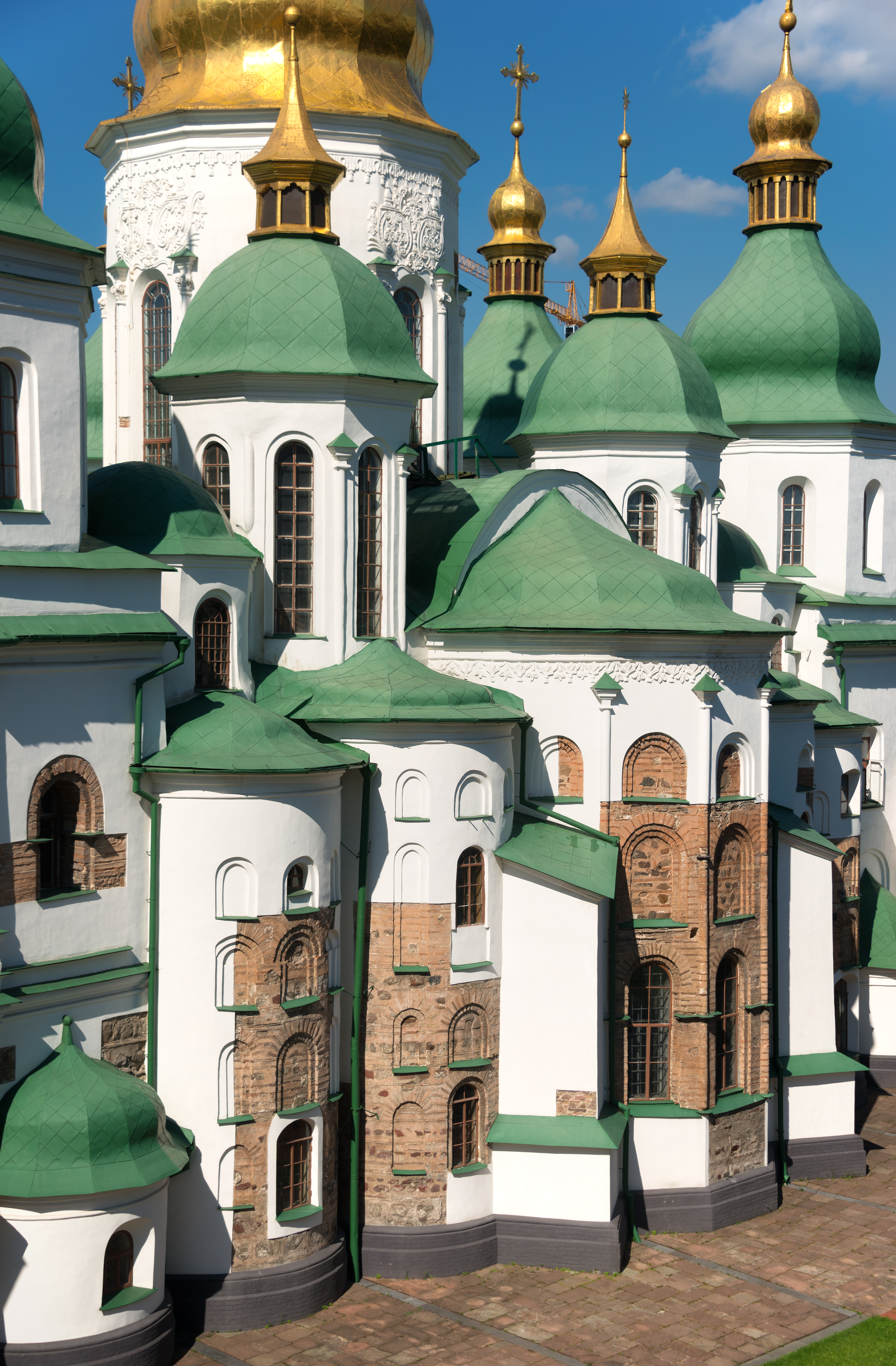 Собор Софійський, Київ, Володимирська вул., 24